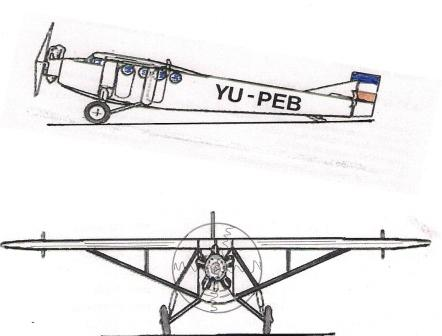 Фарман F.190